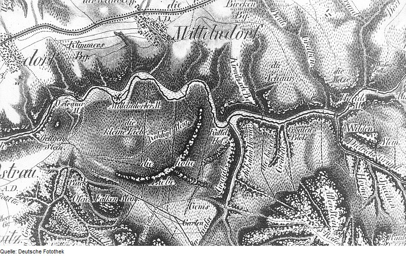 Original image description from the Deutsche Fotothek Kirnitzschtal-Mittelndorf. Oberreit, Sect. Stolpen, 1821/22